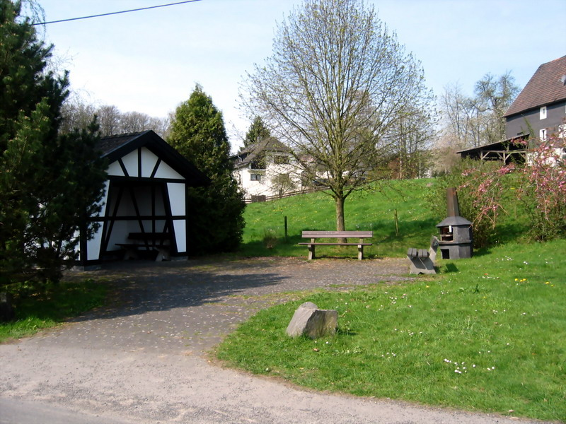 Dorfplatz von Hahn - Ortsteil der Stadt Waldbröl